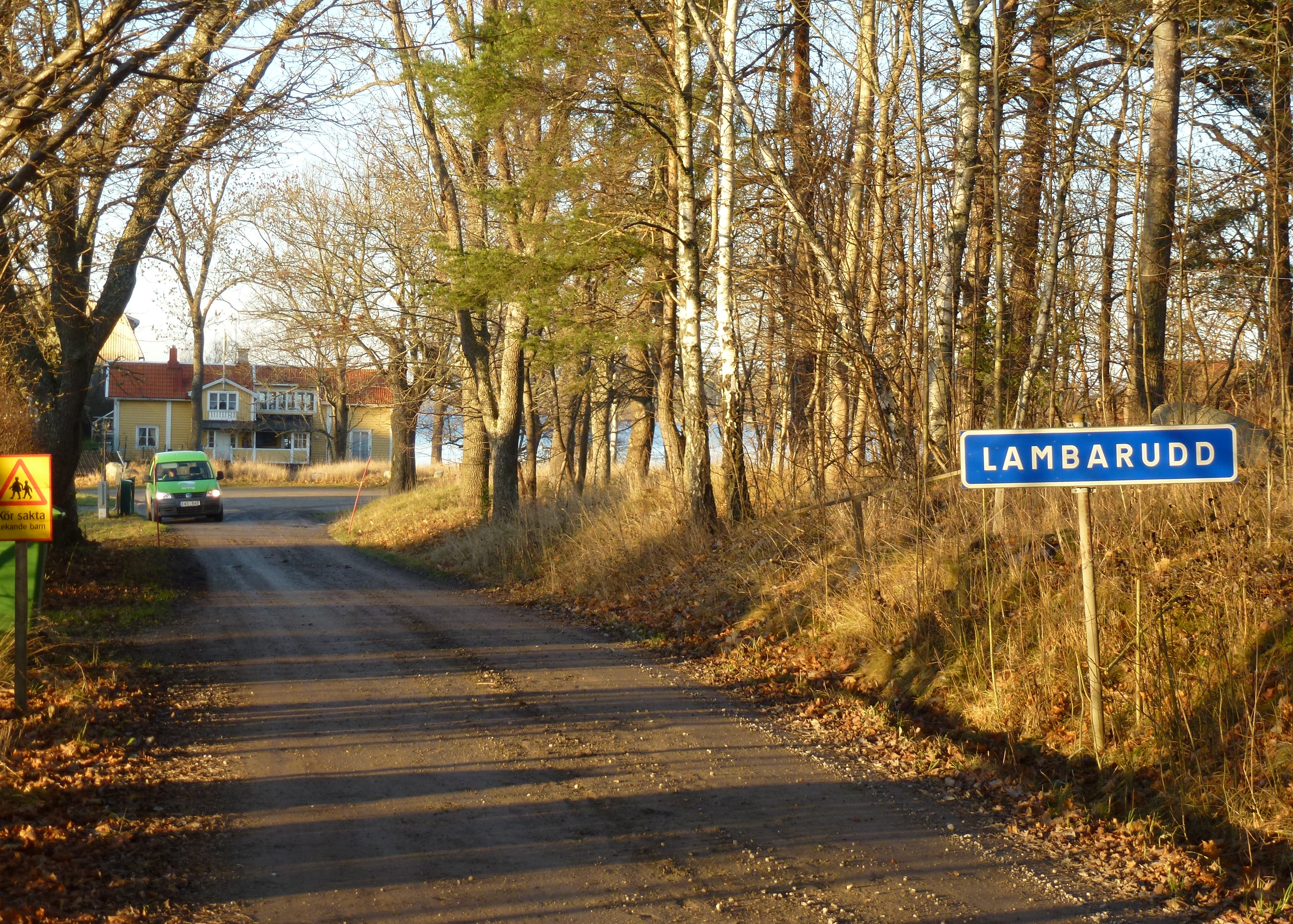 Lambarudd på Lovön, Ekerö kommun